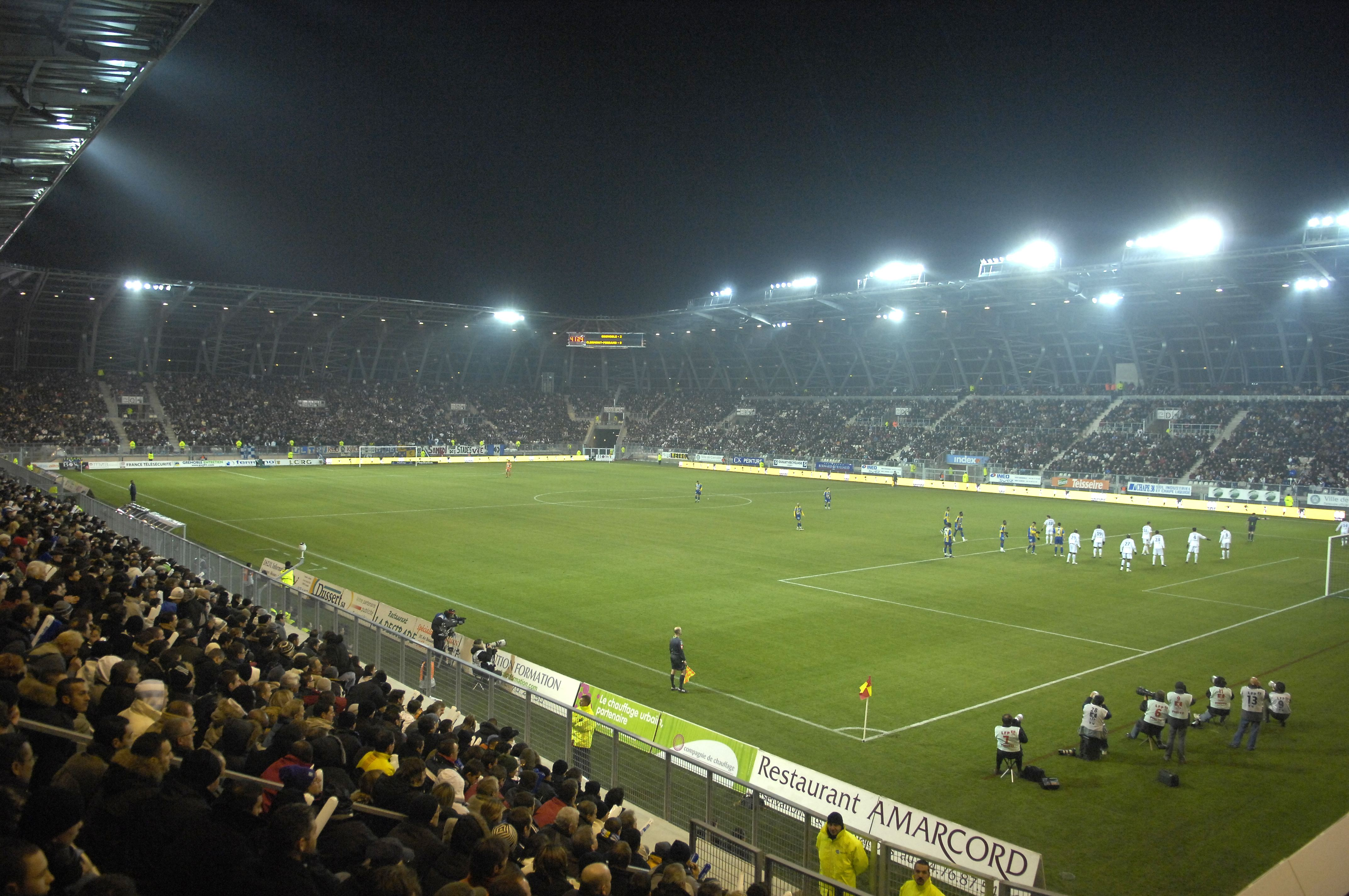 Match Grenoble-Clermont-Ferrand au Stade des Alpes le 15/02/2008.